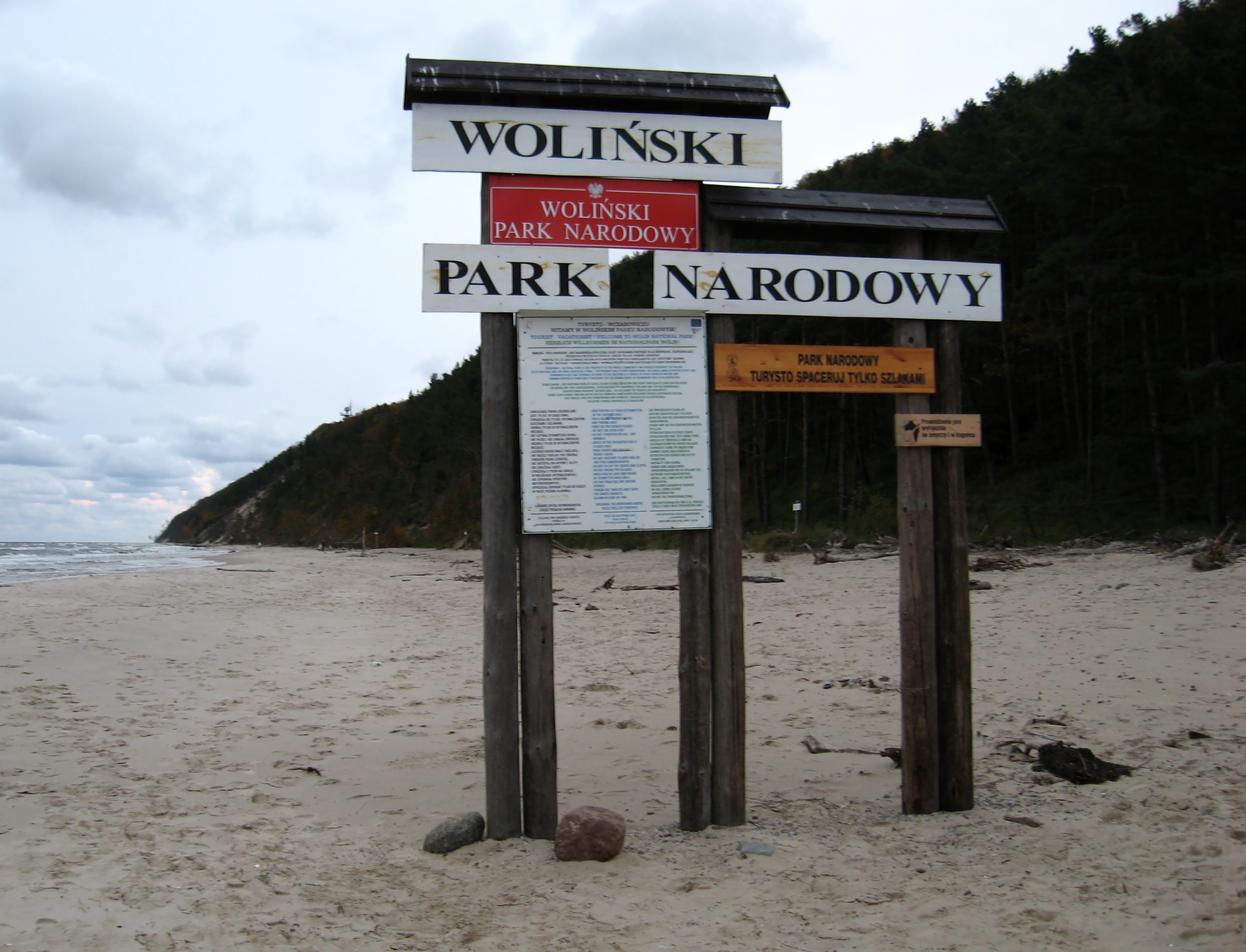 Woliński Park Narodowy - tablica na plaży w Międzyzdrojach